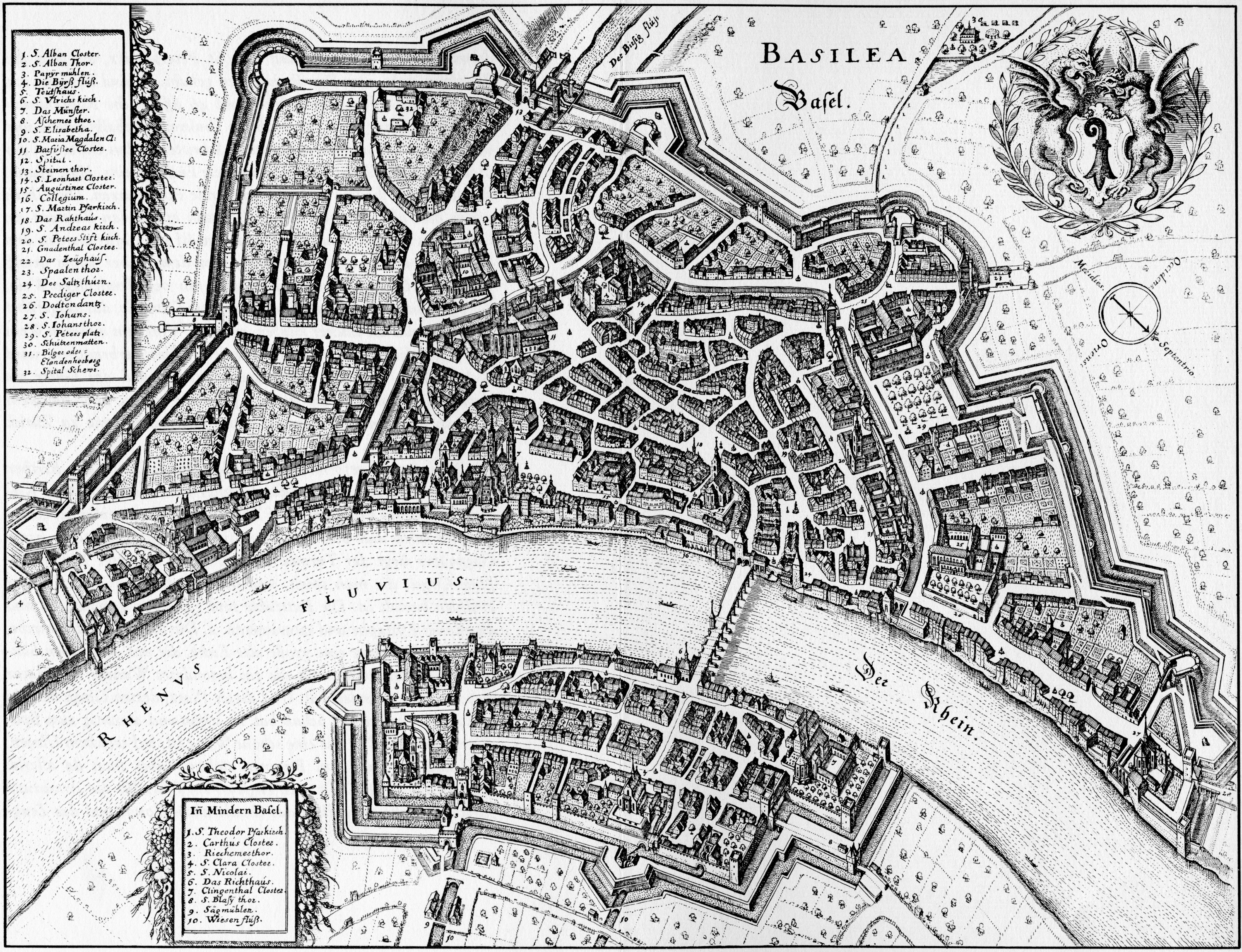 Ansicht der Stadt Basel, Schweiz um 1642